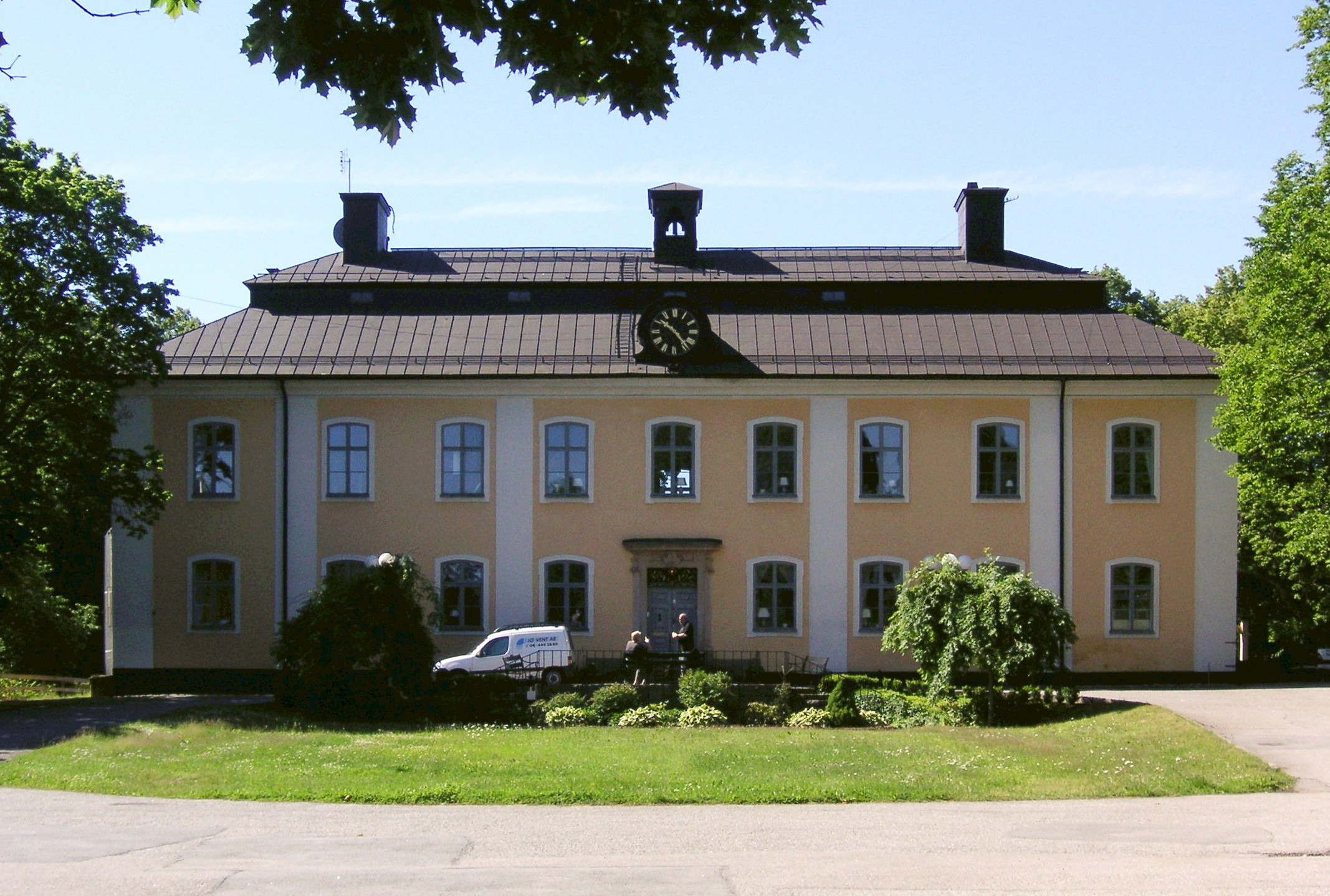 Åkeshovs slott i Bromma, Stockholm